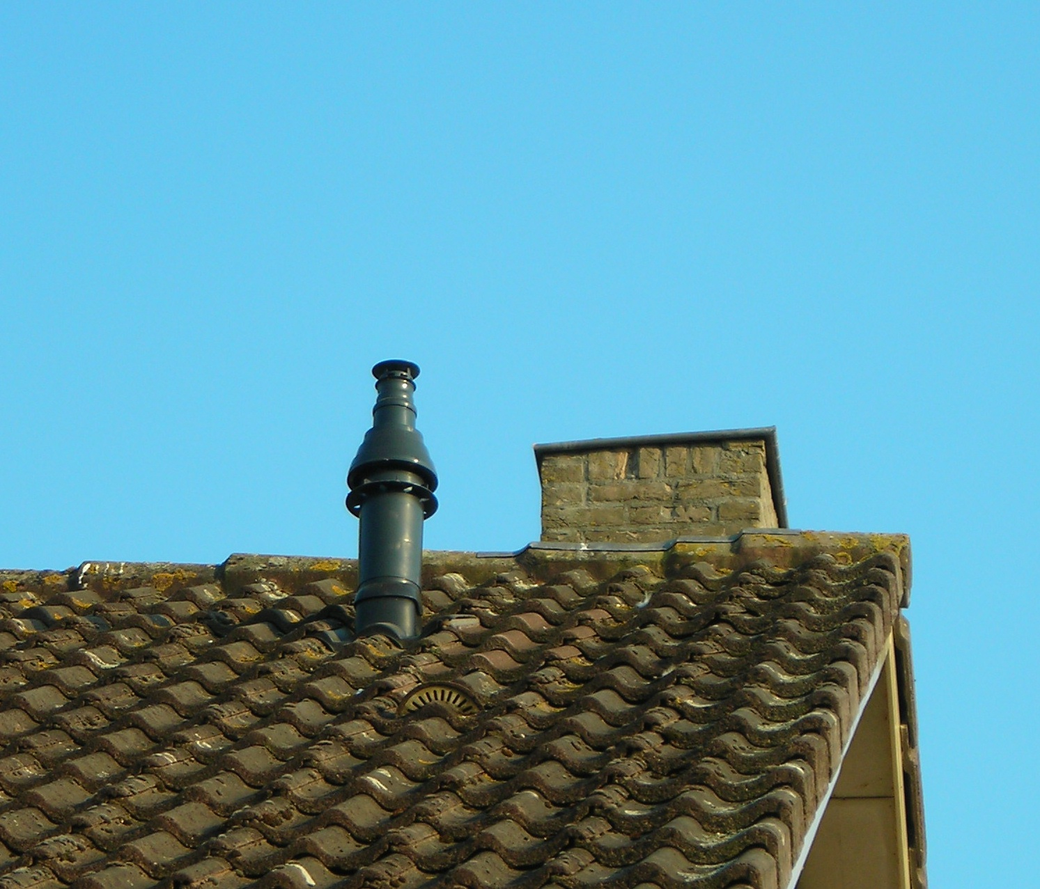 Two different chimneys